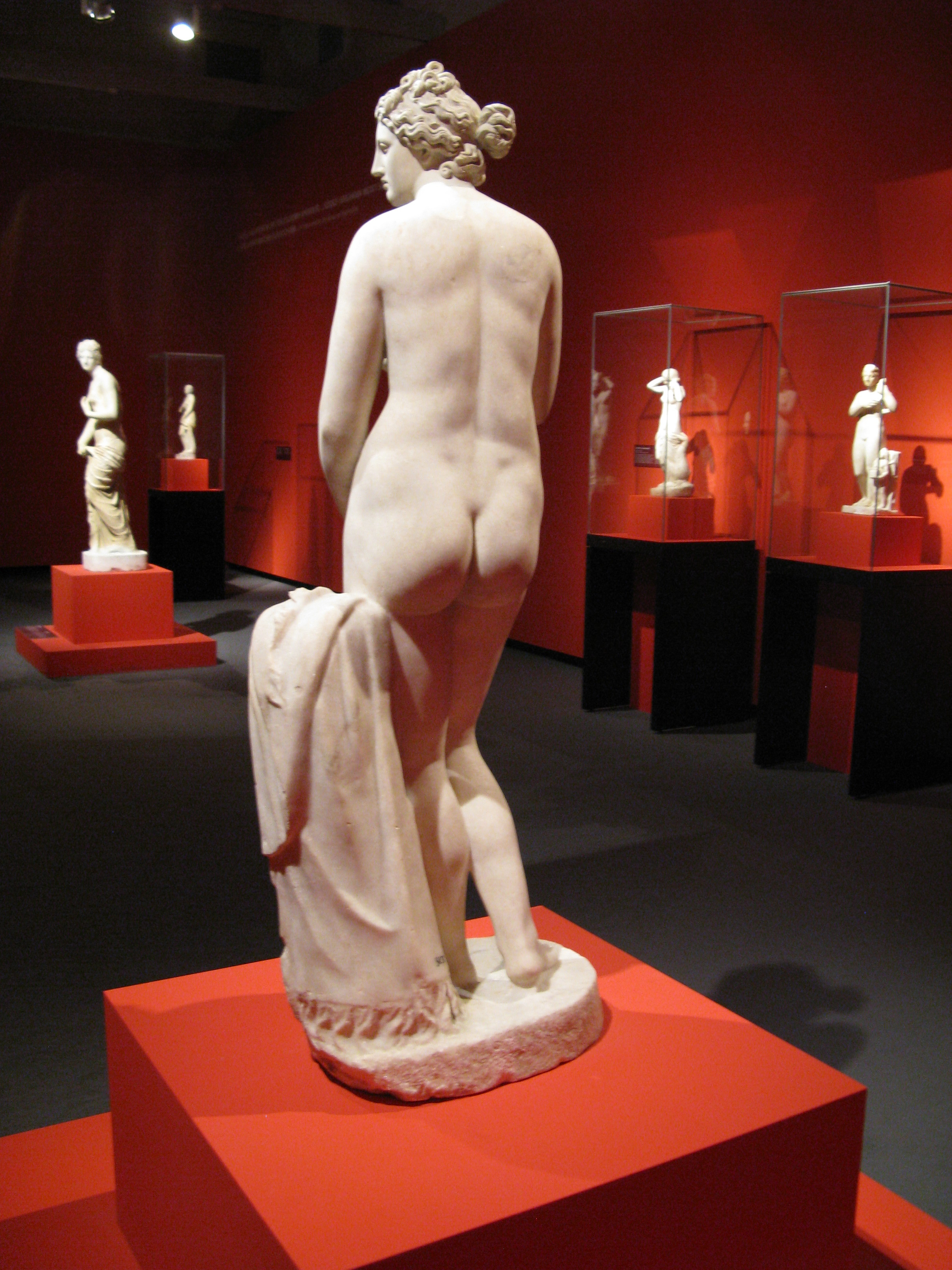 Unterlebensgroße Statue der Aphrodite Typ Capitolina, geschaffen um die Mitte des 2. Jahrhunderts nach einer Vorlage aus dem Frühhellenismus, 1826 aus der Villa Aldobrandini in Rom für die Antikensammlung Berlin/Pergamonmuseum erworben, Marmor, Höhe 1,37m, Inventarnummer SMB Sk 30